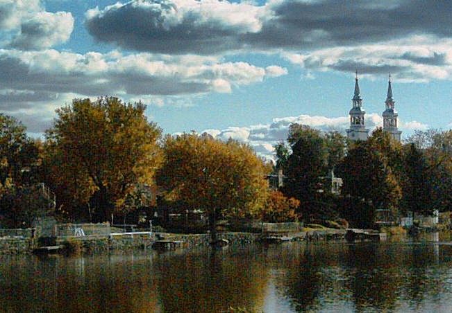 La rivière des prairies et l'église de la paroisse de la Visitation du Sault-au-Récollet vues de l'île de la Visitation.